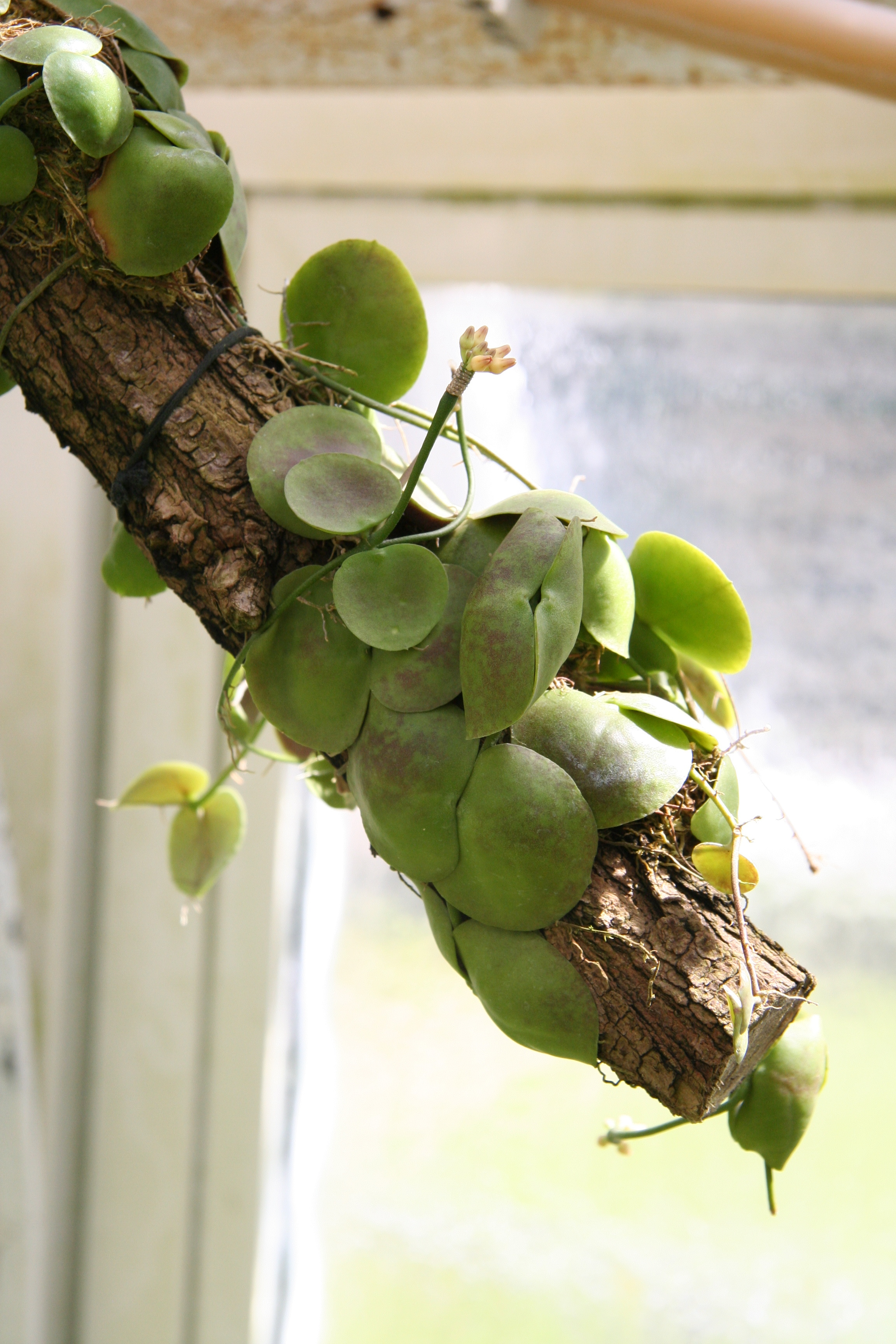 Dischidia imbricata im Botanischen Garten Berlin